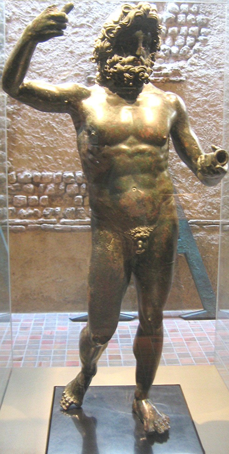 Statue en bronze du Jupiter Stator, Ier siècle, retrouvé au Vieil-Évreux, conservé au musée d'Évreux